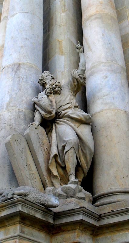 Krzeszów, kościół, ob. par. p.w. Wniebowzięcia NMP, 1728-1735